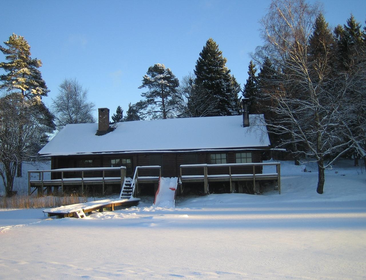 Vinterbild av Chalmersbastun i Härryda.